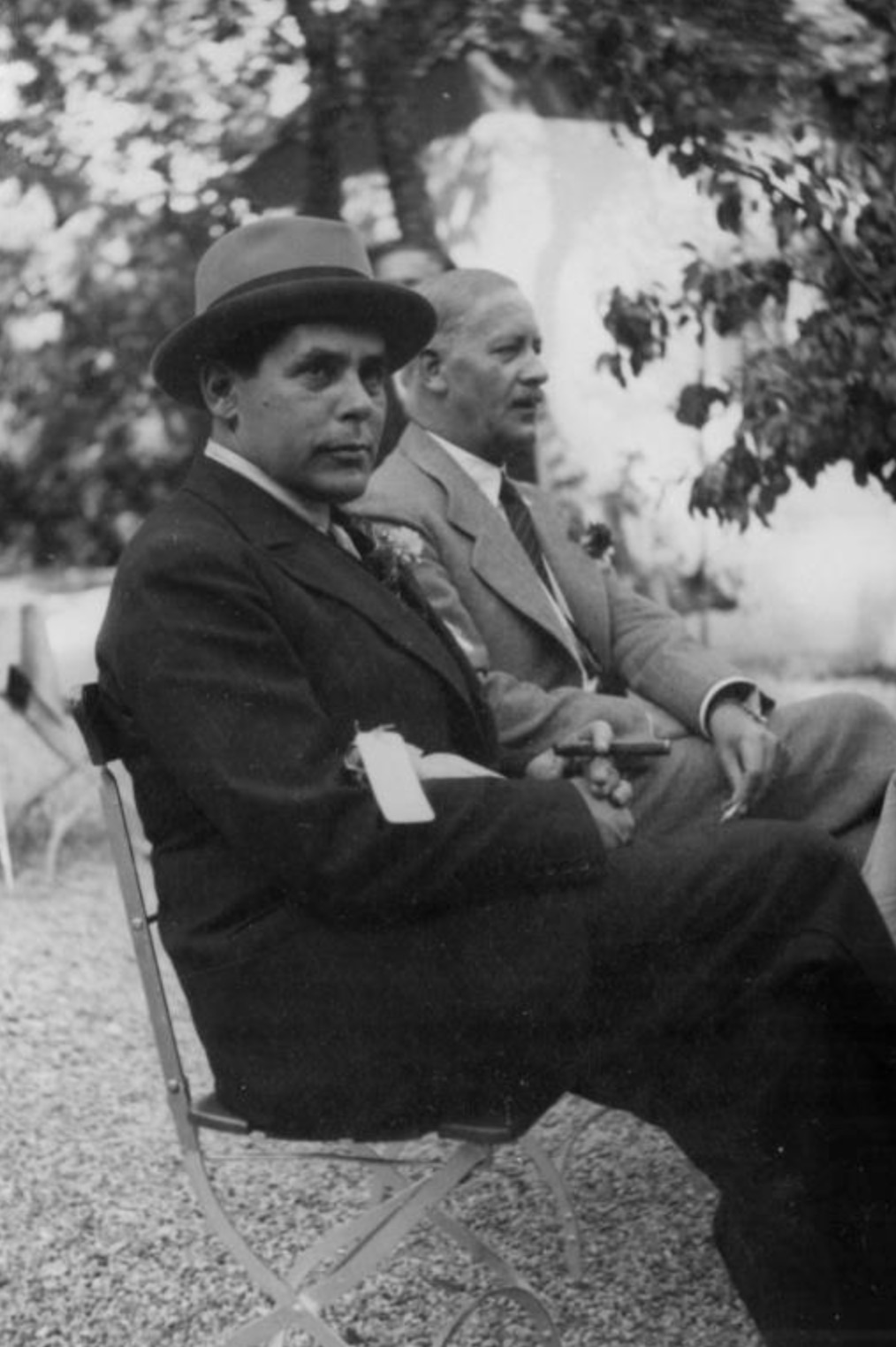 Schweizer Diplomat, Hans Frölicher (1887–1961)